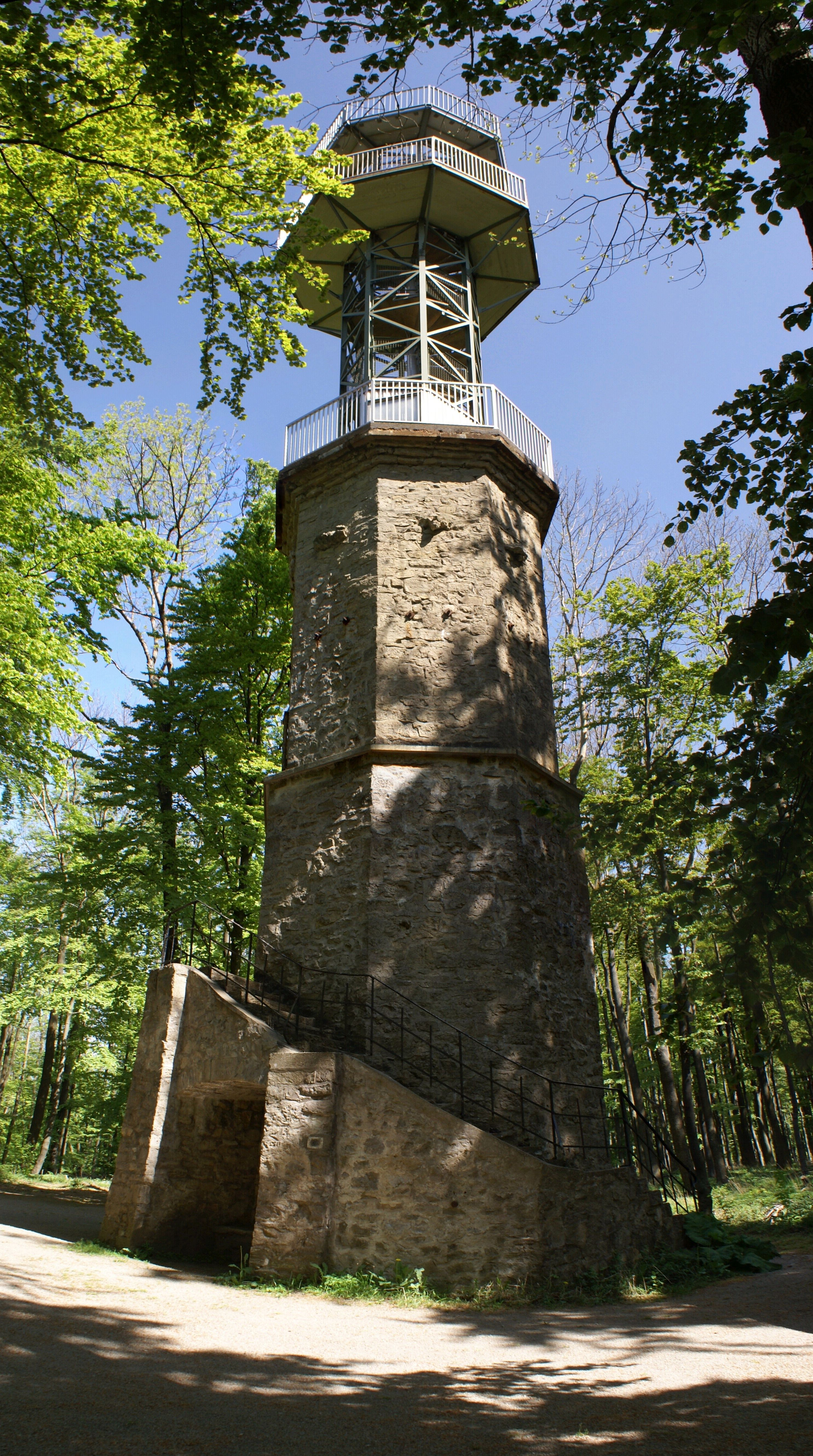 Lönsturm auf dem Kanstein bei Salzhemmendorf